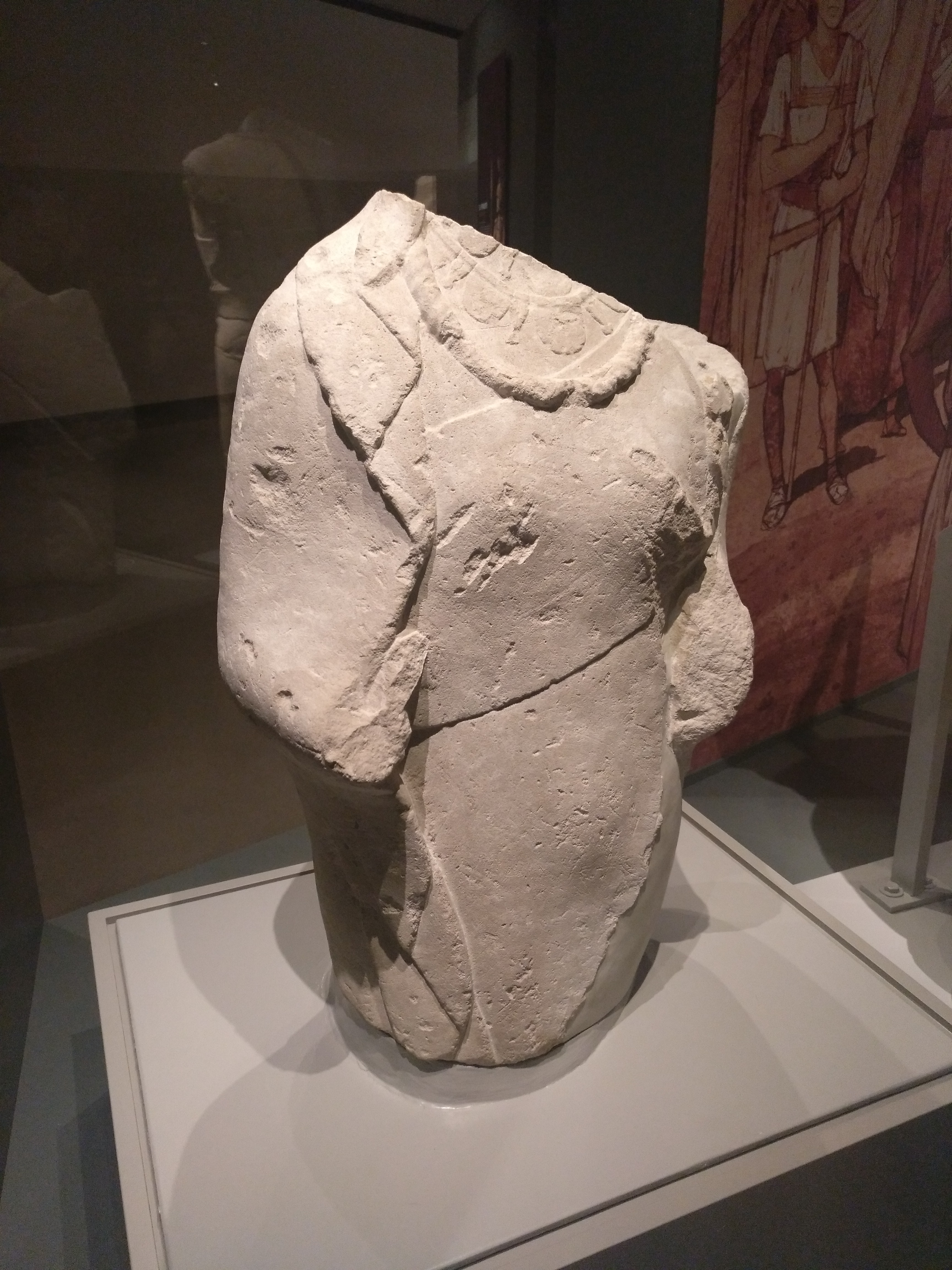 Busto de dama localizado en el Cerro Alcalá de Torres, Jaén. Finales de siglo V a.C.